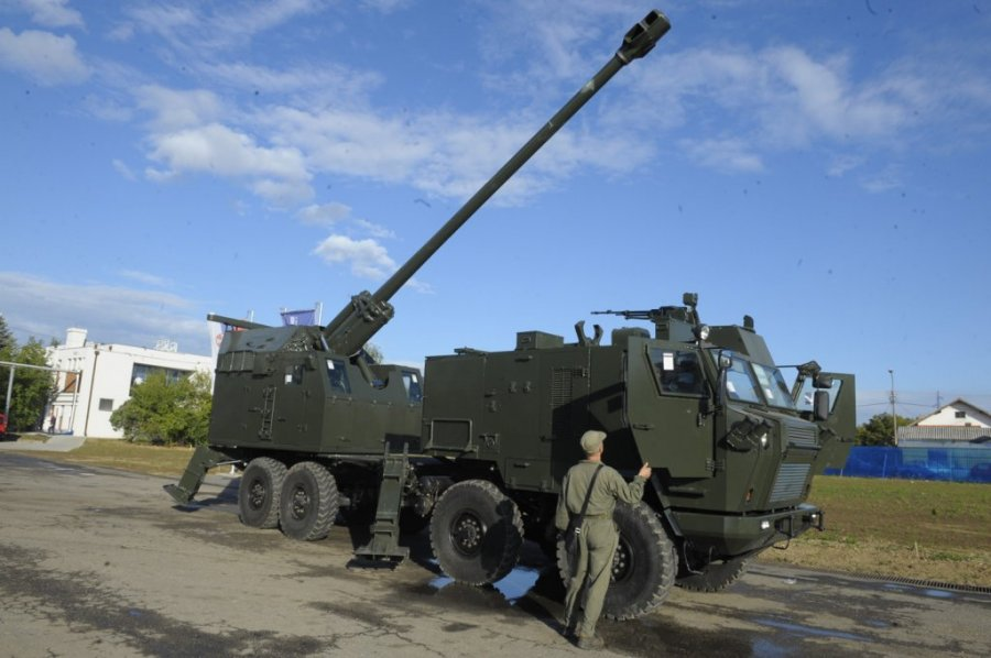 Српски (ћирилица): Nora B-52 155mm фотографисана приликом посете бившег министра одбране Небојше Родића компанији Yugoimport SDPR